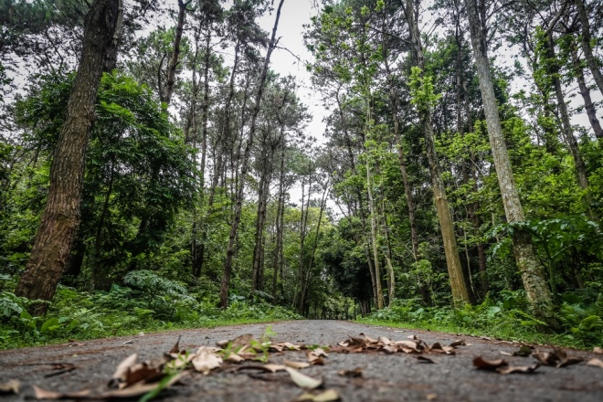 Vườn thực vật Quốc gia